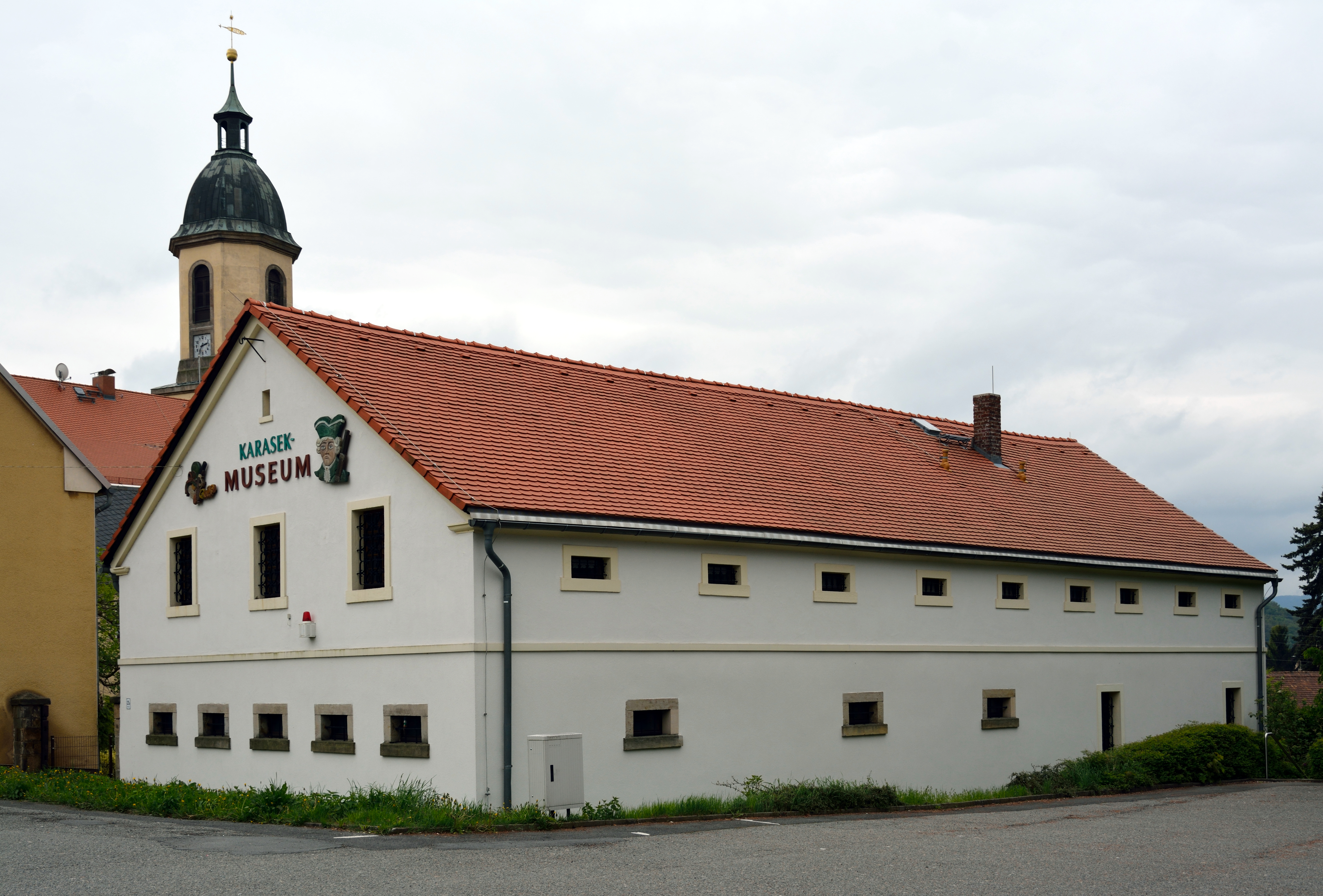 Karasek-Museum, Seifhennersdorf, Sachsen